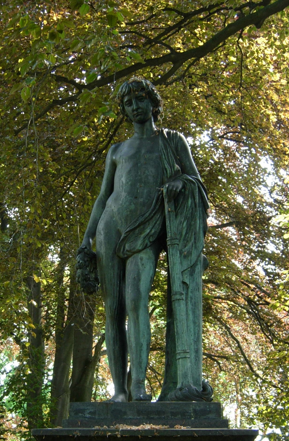 Gustav Kietz: Genius (1883) über dem Grab der Familie Wesendonck auf dem Alten Friedhof Bonn; hergestellt in der Kunstgießerei Lauchhammer